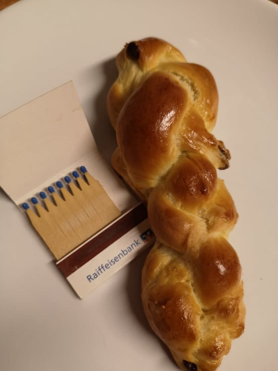 Sackschlupfer, ca 15 cm groß, geflochten aus zwei Strängen lockerem Hefeteig.